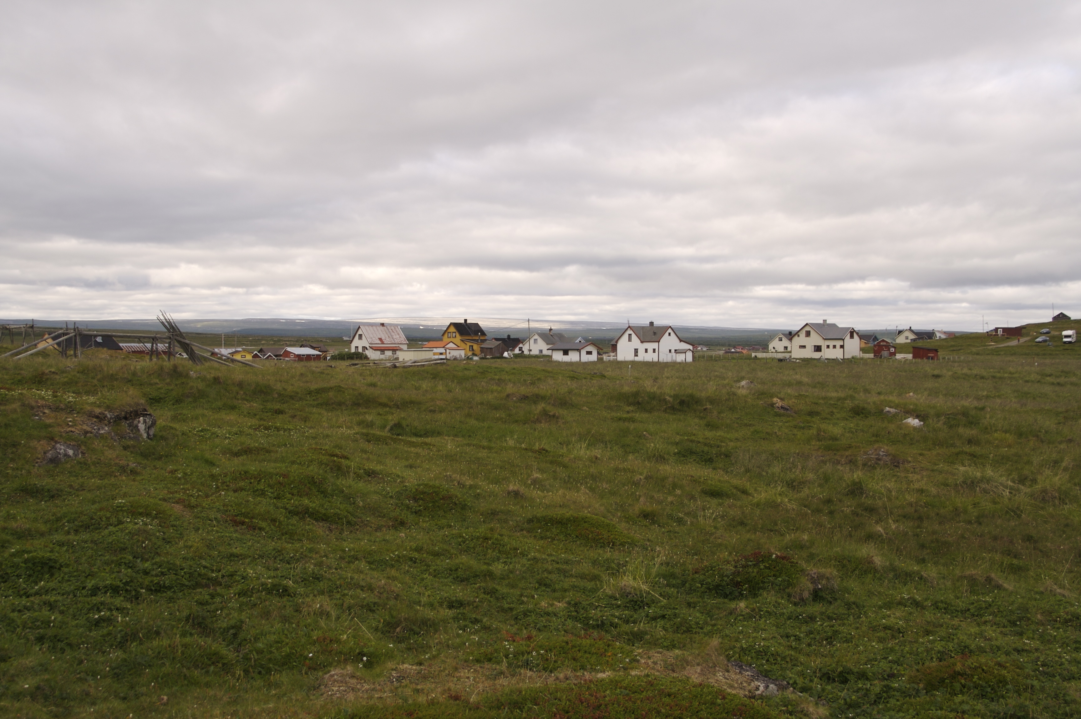 The village Ekkerøy in Vadsø, Finnmark, Norway